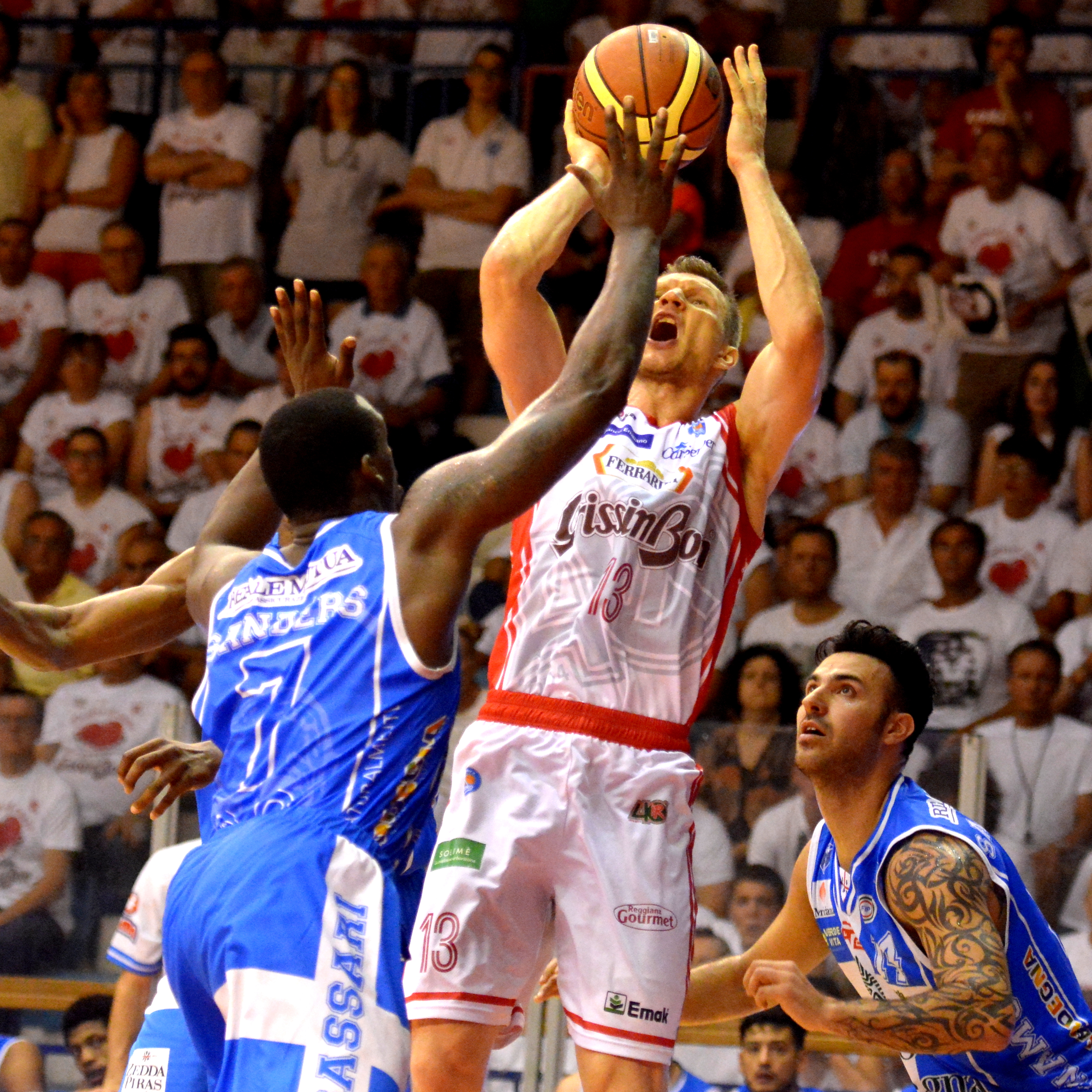 Rimantas Kaukenas al tiro da tre nella finale dei play-off 2014/2015